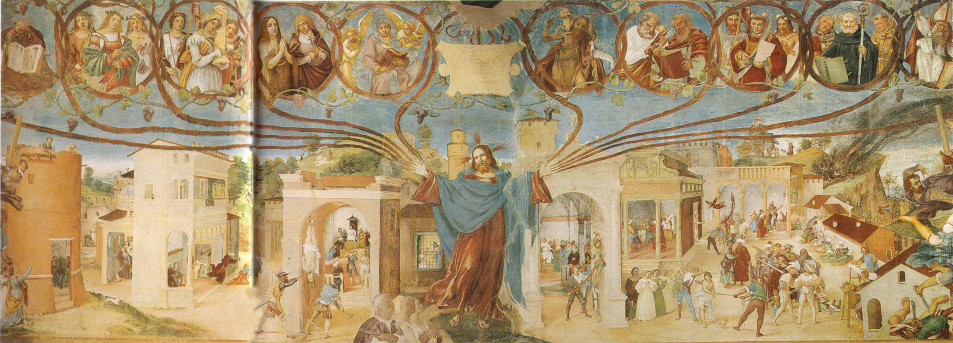 Lotto, affreschi di trescore